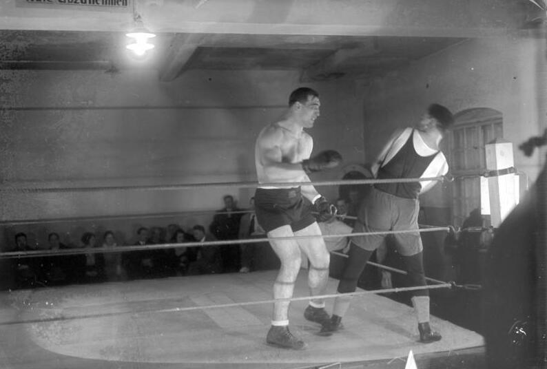 Der Boxriese Carnera trainiert zum ersten Mal in der Sporthalle des Berliner Sportpalstes ! Der Boxriese Carnera während eines Trainingskampfes im Ring des Sportpalastes in Berlin.